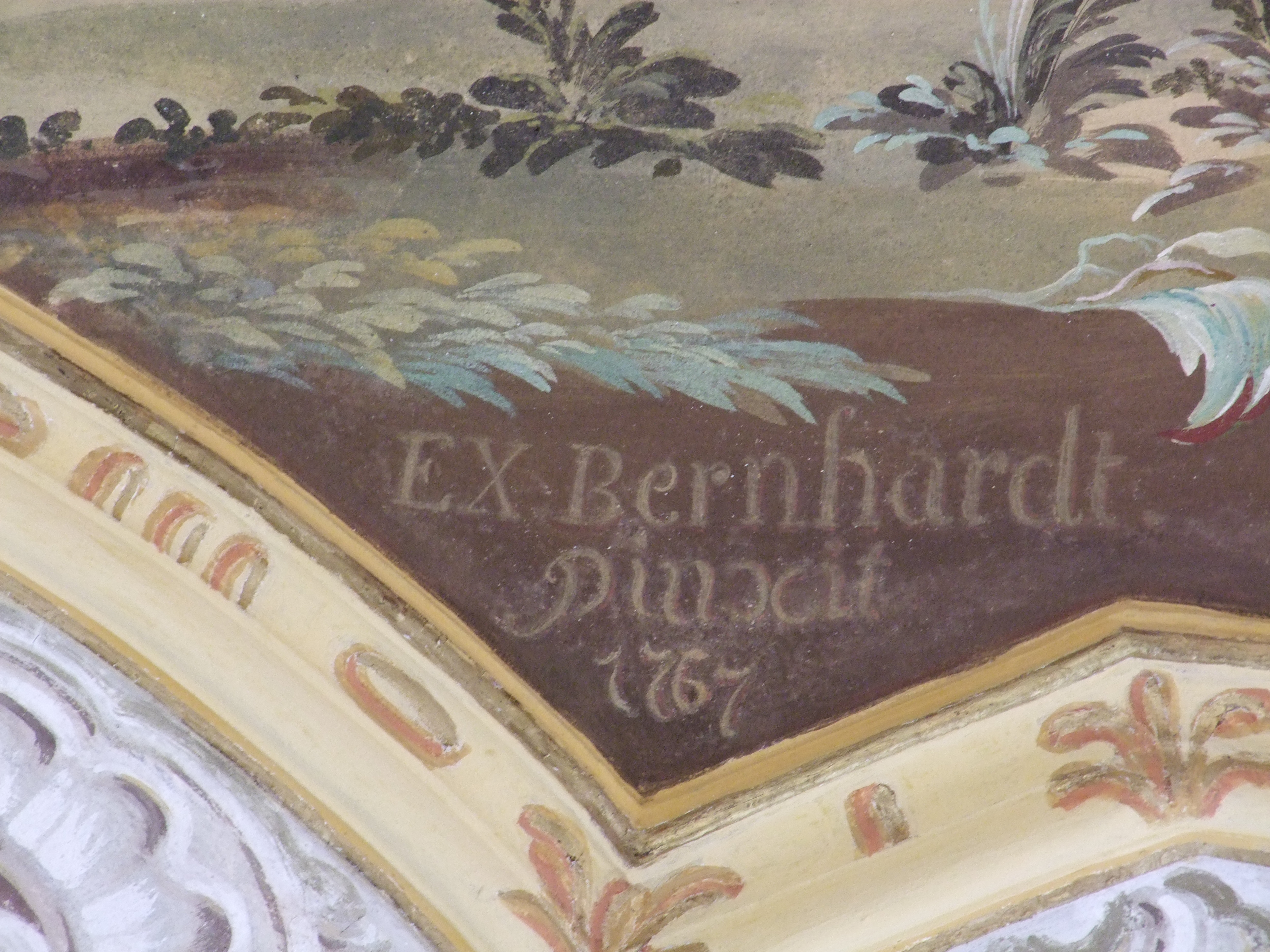 St. Bartholomäus im oberschwäbischen Apfeltrach in Bayerisch/Schwaben